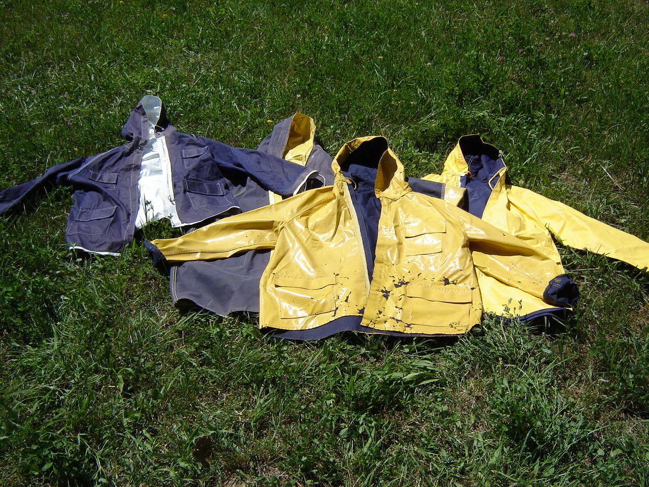 4 Friesennerze auf Wiese